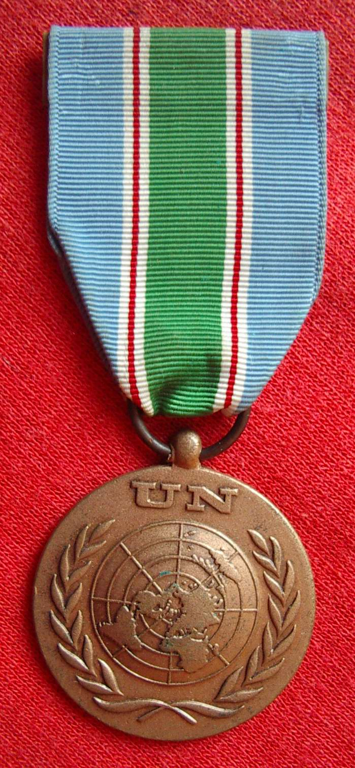 Médaille de l'ONU (Finul) Source: photo et collection Rémi Stosskopf florival fr Date: 06-05-2006